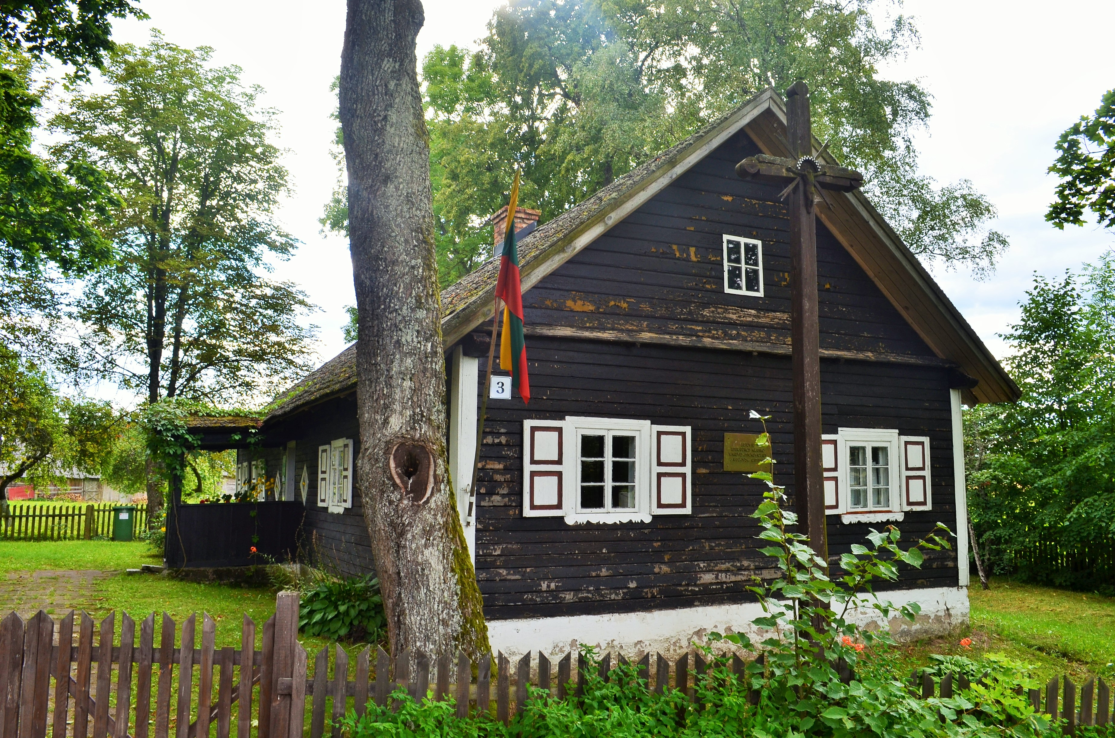 Subartonys, V. Krėvės namas-muziejus, Varėnos raj.